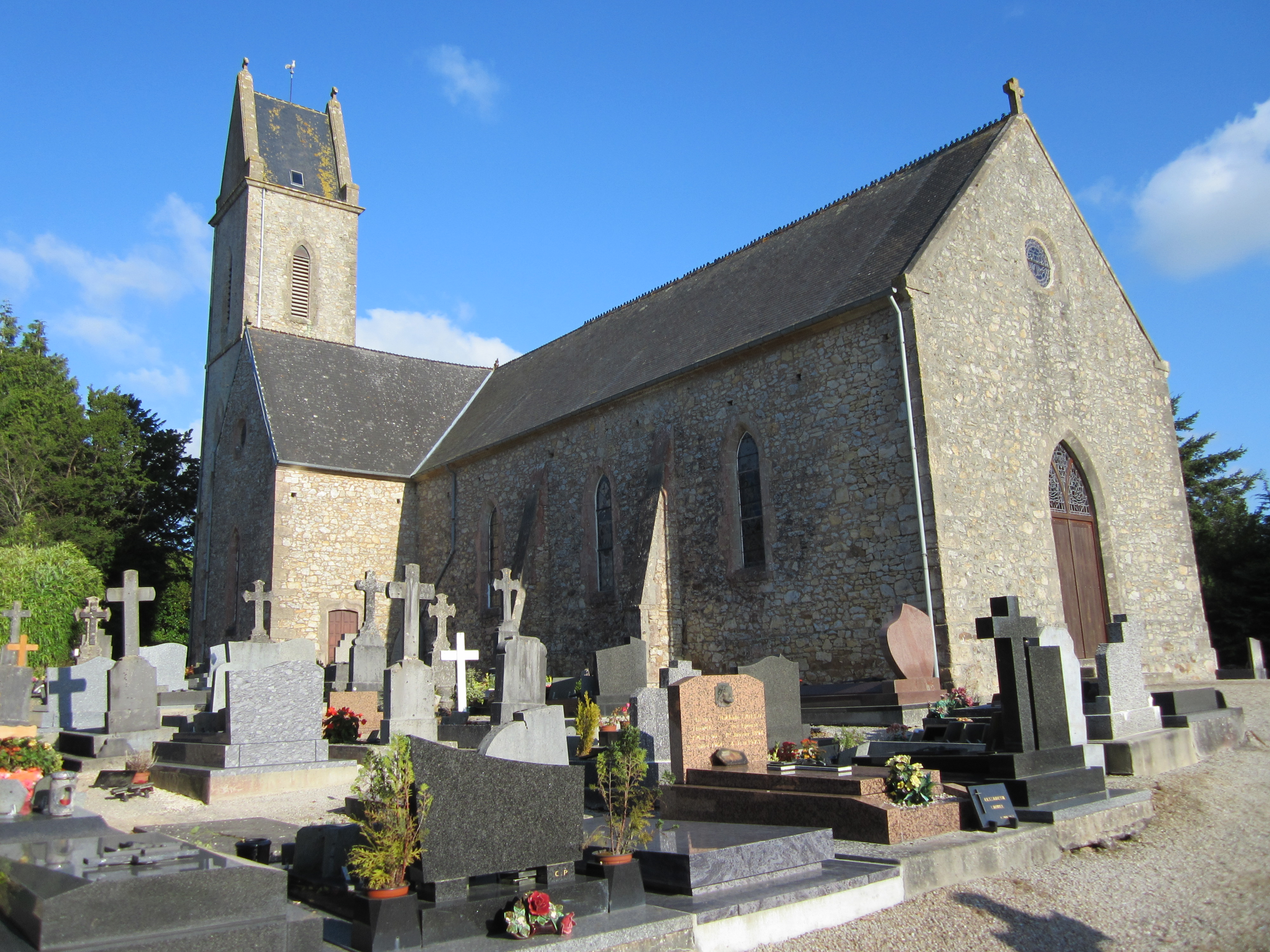 Eglise Notre-Dame des Anges de Ruffosses, Saussemesnil